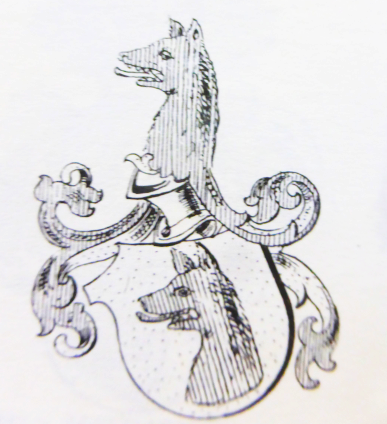 Wappen der Kastner von Amberg